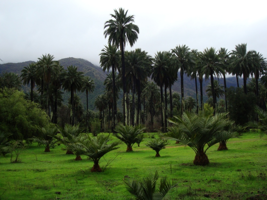 es endémica de Chile y una de las más australes del mundo. Habita la zona central de Chile y puede vivir más de 1.000 años, sobreviviendo a los climas más adversos. Su altura llega hasta los 30 metros en algunos ejemplares. Sin duda la palma chilena podría considerarse de las palmas más bellas y resistentes del mundo; otorgándonos además, con su Savia y sus frutos, un delicioso brebaje: “la Miel de Palma”.